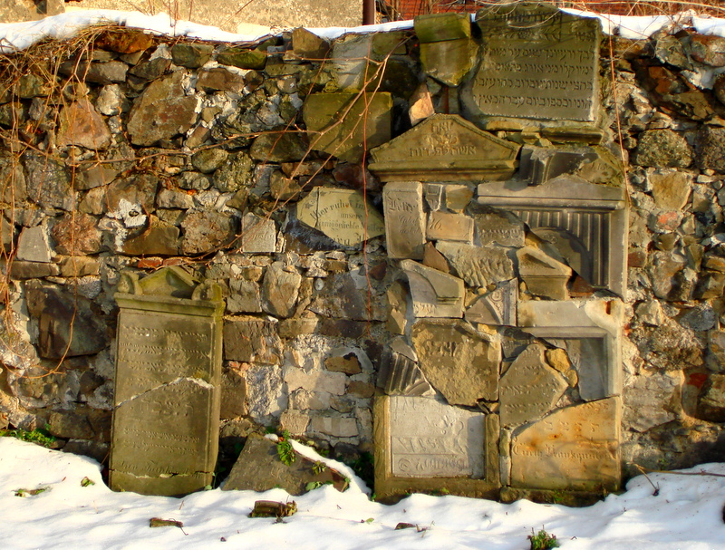 Kamienna Góra, cmentarz żydowski, 1 poł. XIX